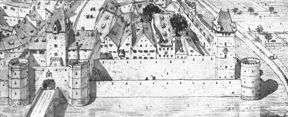 Abb. 30. Das Isartor und der Luginsland.